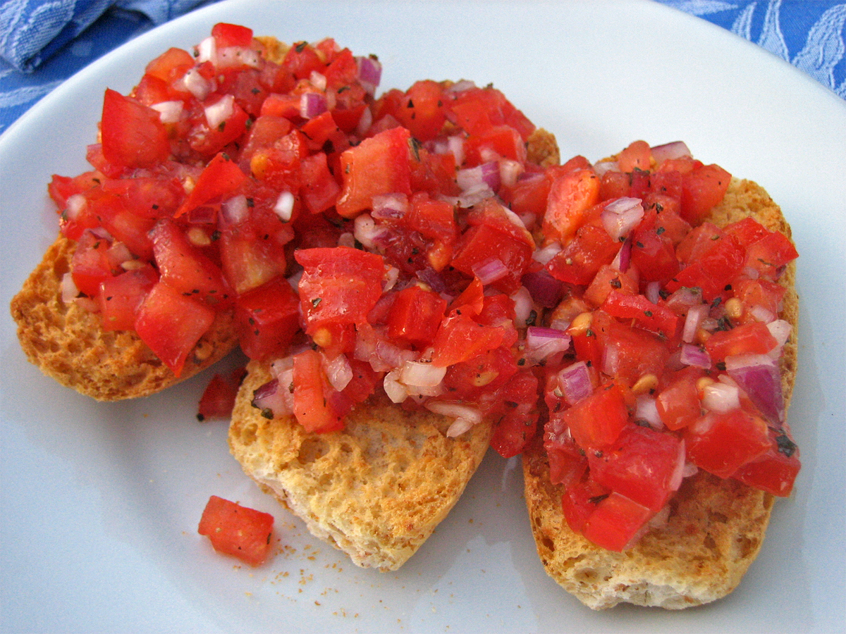 crostini al pomodoro